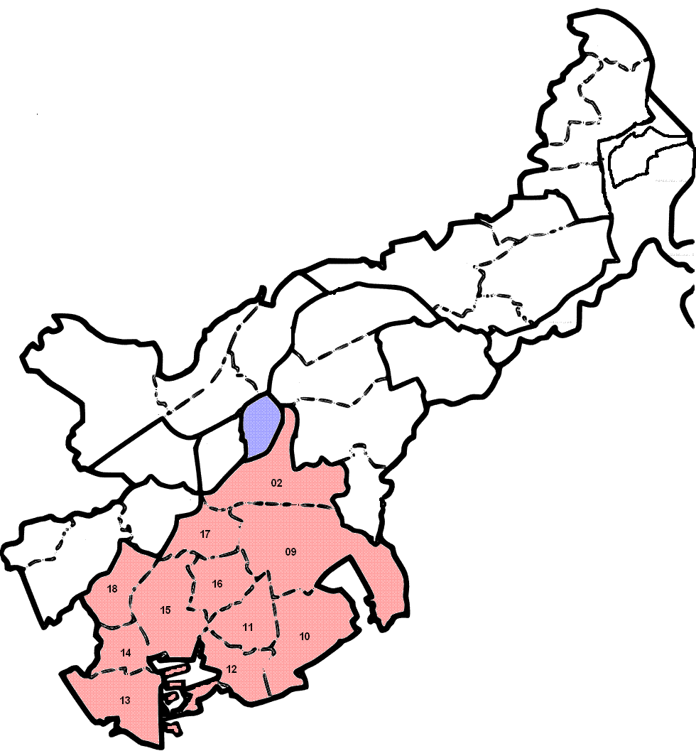 Lage des Stadtteils St. Jürgen in Lübeck (mit Bezirken), selbst erstellt.